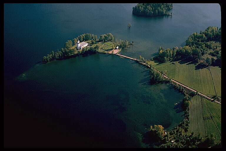 Vid sjön Västra Silen. Bilden troligen från omkring 1980. Motiv: Vårviks kyrka Nyckelord: Flygbilder Kategori: Insjömiljöer, Kyrkomiljö Vid sjön Västra Silen. Bilden troligen från omkring 1980.